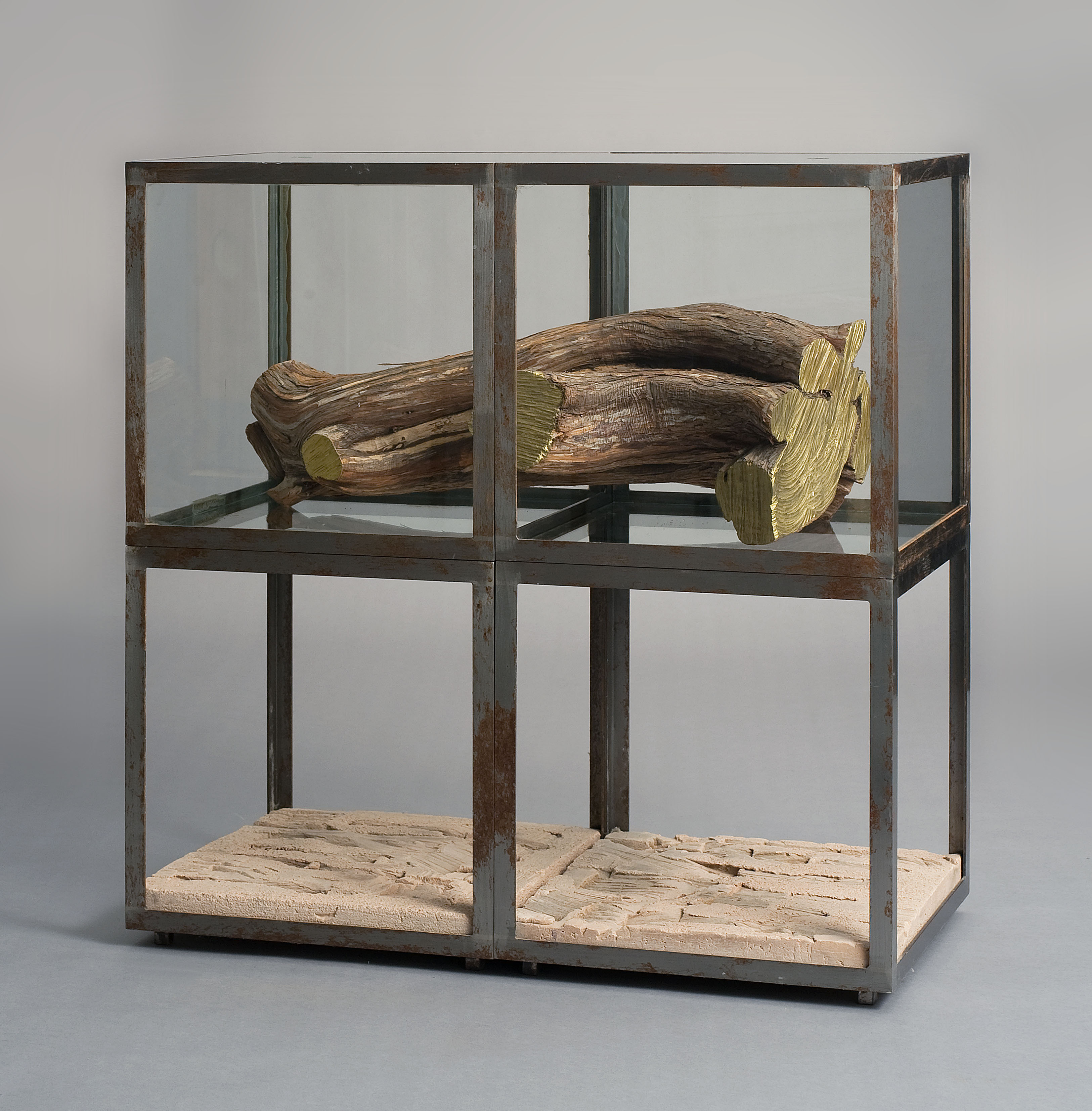 Plaque de terre cuite avec empreintes, bois de cade doré à la feuille, verre, métal. 71,7 x 71,7 x 35,8 cm